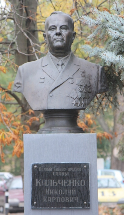 Бюст на Аллее Героев в городе Батайске